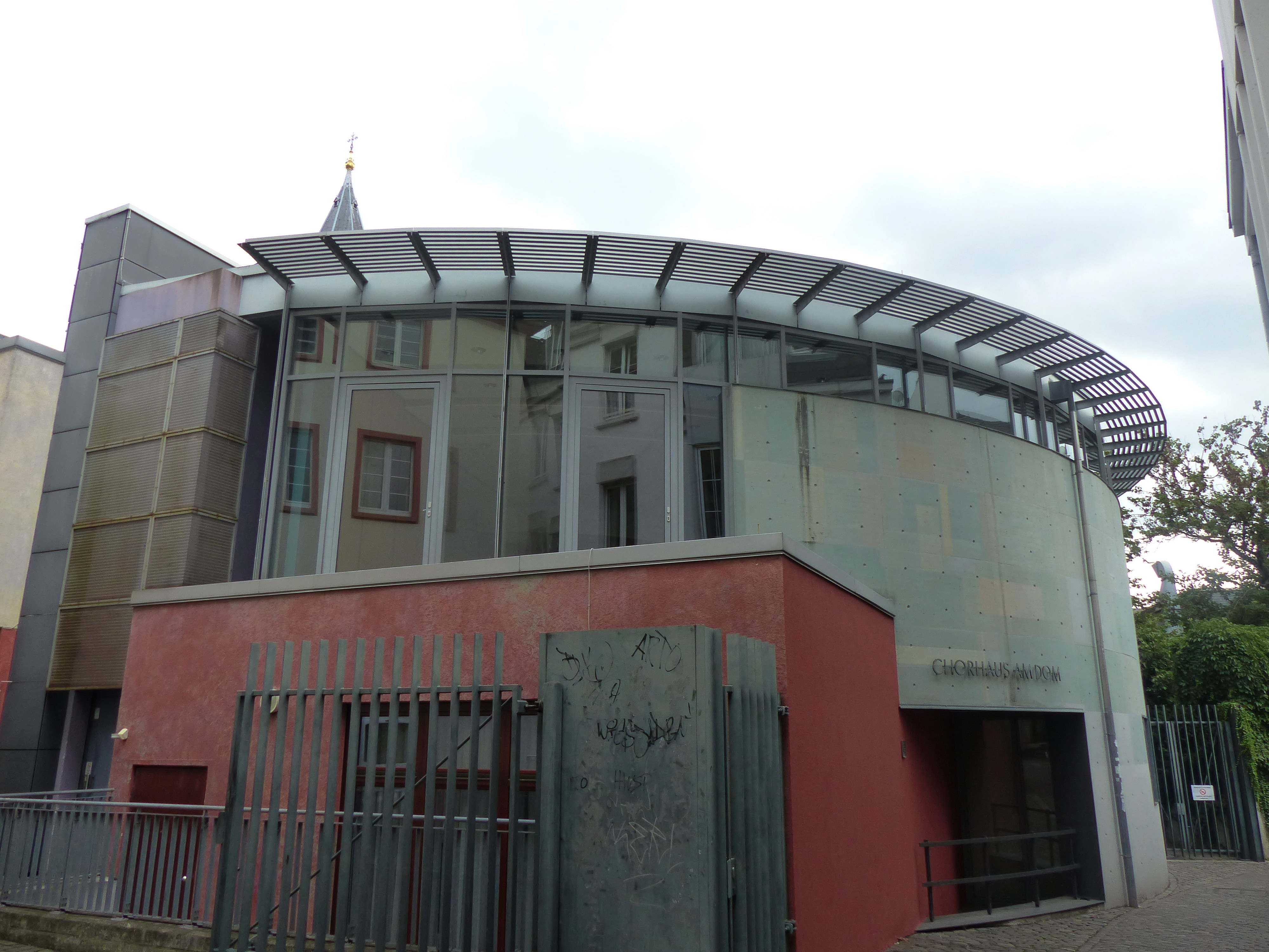 Mainz – Chorhaus am Dom - Mainzer Domchor